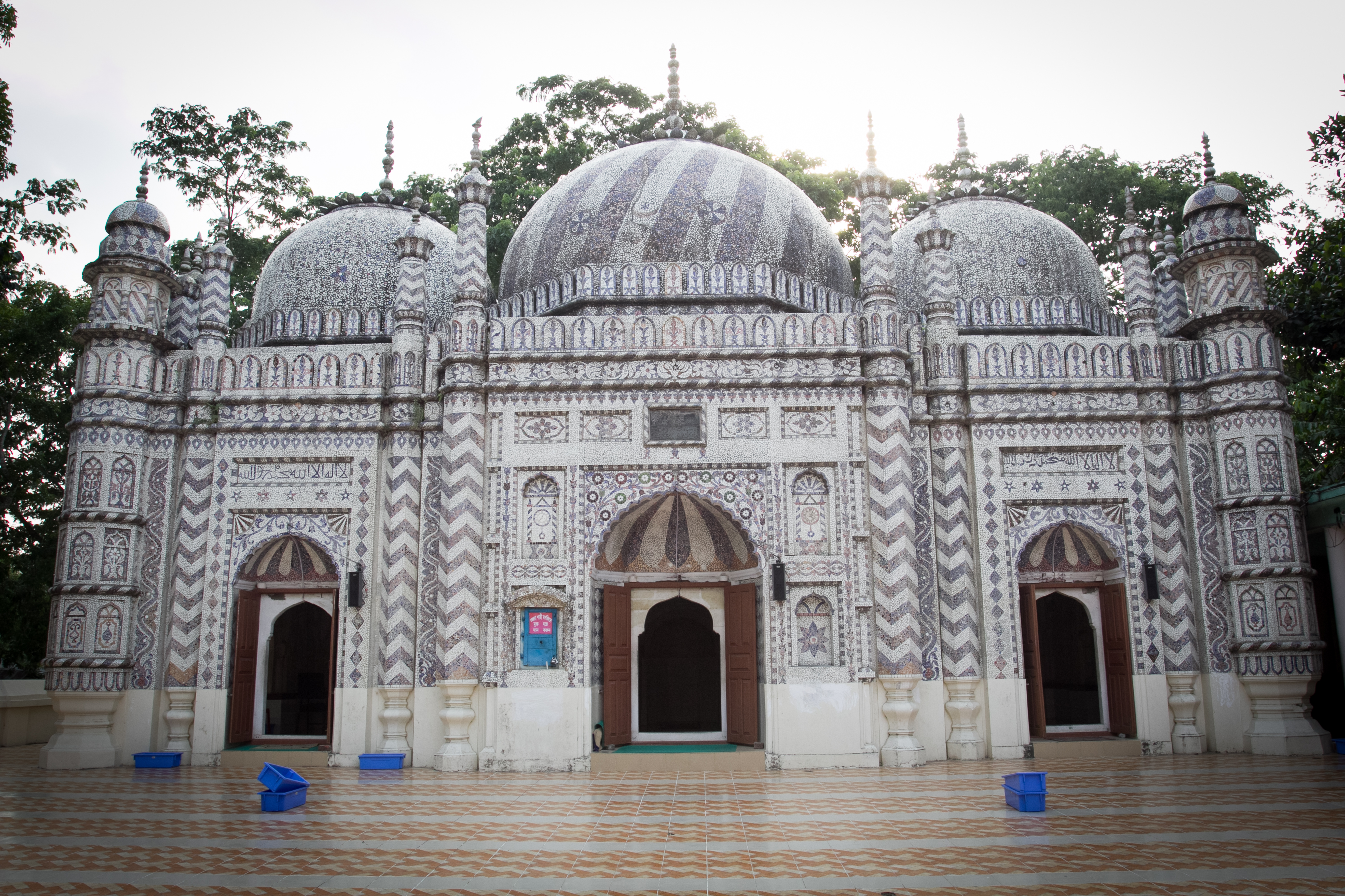 বজরা শাহী মসজিদ